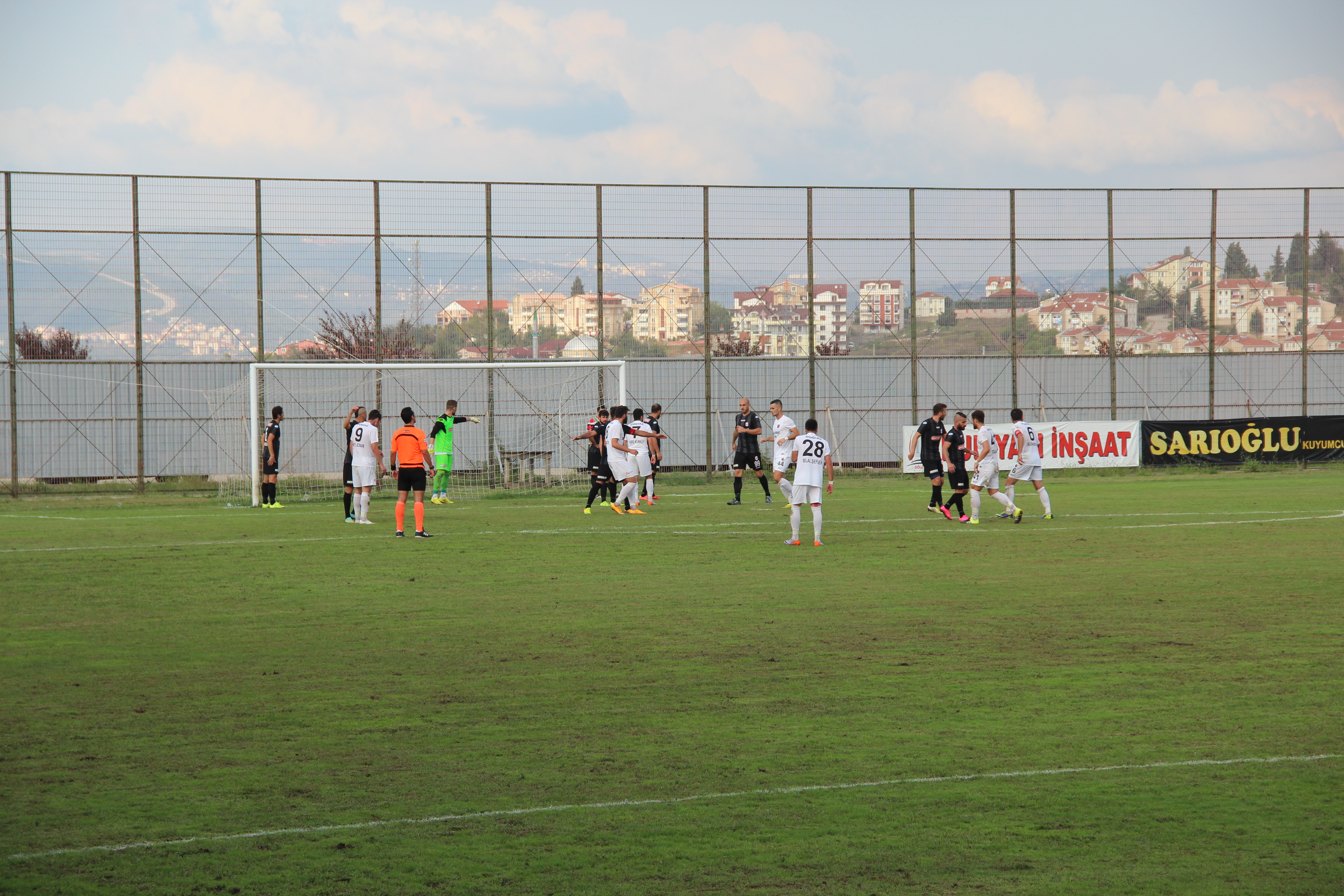 Gölcükspor 1- Burak Kapan, 8- Macit Arabacı, 25- Ensar Çetinkaya, 44- Polat Güren, 5- Selim Kayacı, 6- Sezgin Bektaş, 28- Bilal Şeflek, 41- Oğuzhan Demirer, 7- Emre Kürküt, 9- Yeldar Yamaç, 11- Aziz Kızılgün, Yedekler: 23- Veysel Boz, 91- Muhammet Aran, 98- Mehmet Sayan, 10- Cemal Doğu, 22- Ender Acar, 26- Adem Hakan Denizer, 13- Veysi Öz, Teknik Direktör: Ali Beykoz, Dardanelspor 1- Murat Hocaoğlu, 4- Erdem Özkurt, 17- Uğur Aygören, 20- Vahit Yaşar, 22- Ufuk Arslan, 72- Taner Araz, 5- Uğur Parlak, 14- Nuri Fatih Aydın, 23- Yusuf Atay, 10- İlker Sayan, 99- Özer Kutlu, Yedekler: 59- Ümit Korkut, 3- Suat Bozkurt, 11- Harun Kelleci, 19- Mert Han Özkan, 77- Batuhan Irmak, 96- Sertaç Kayatekin, 6- Ufukcan Engin, Teknik Direktör: Fatih Uygun, Hakemler: Mert Büyükgiray, Ufuk Altunbaş, Ali Balsatar, Abdülkadir Düzgün